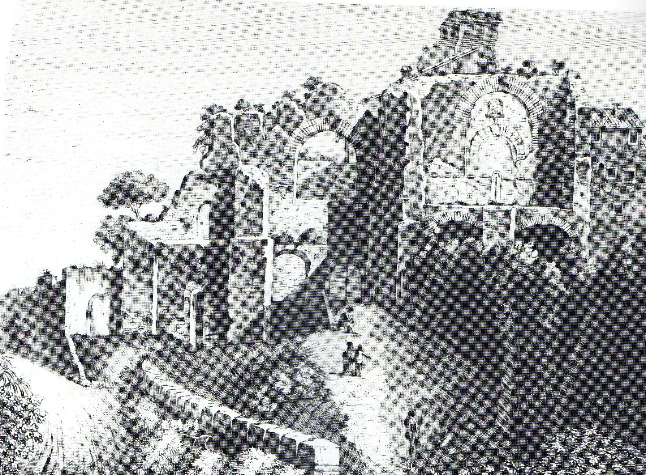 Le terme di Caracalla ad Albano Laziale (RM) in un'incisione anonima settecentesca